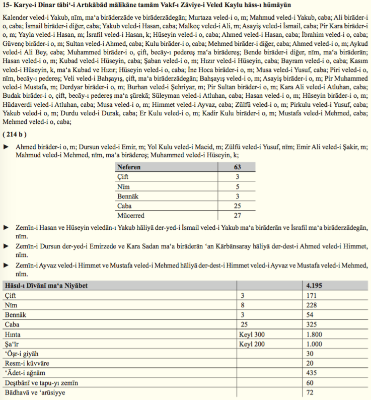 Artukabad(Artova) Nahiyesi Dinar(Günçalı) Köyü Tapu, Gelir ve Hane Kayıtları